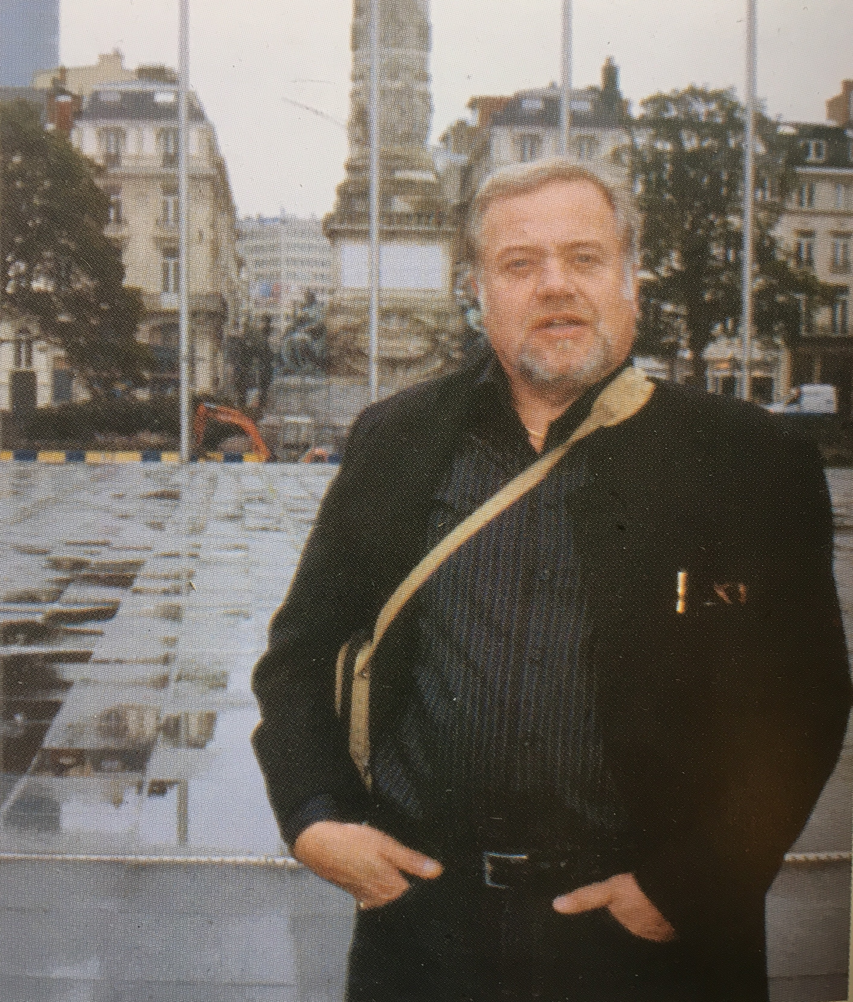 Jussi Vesanen